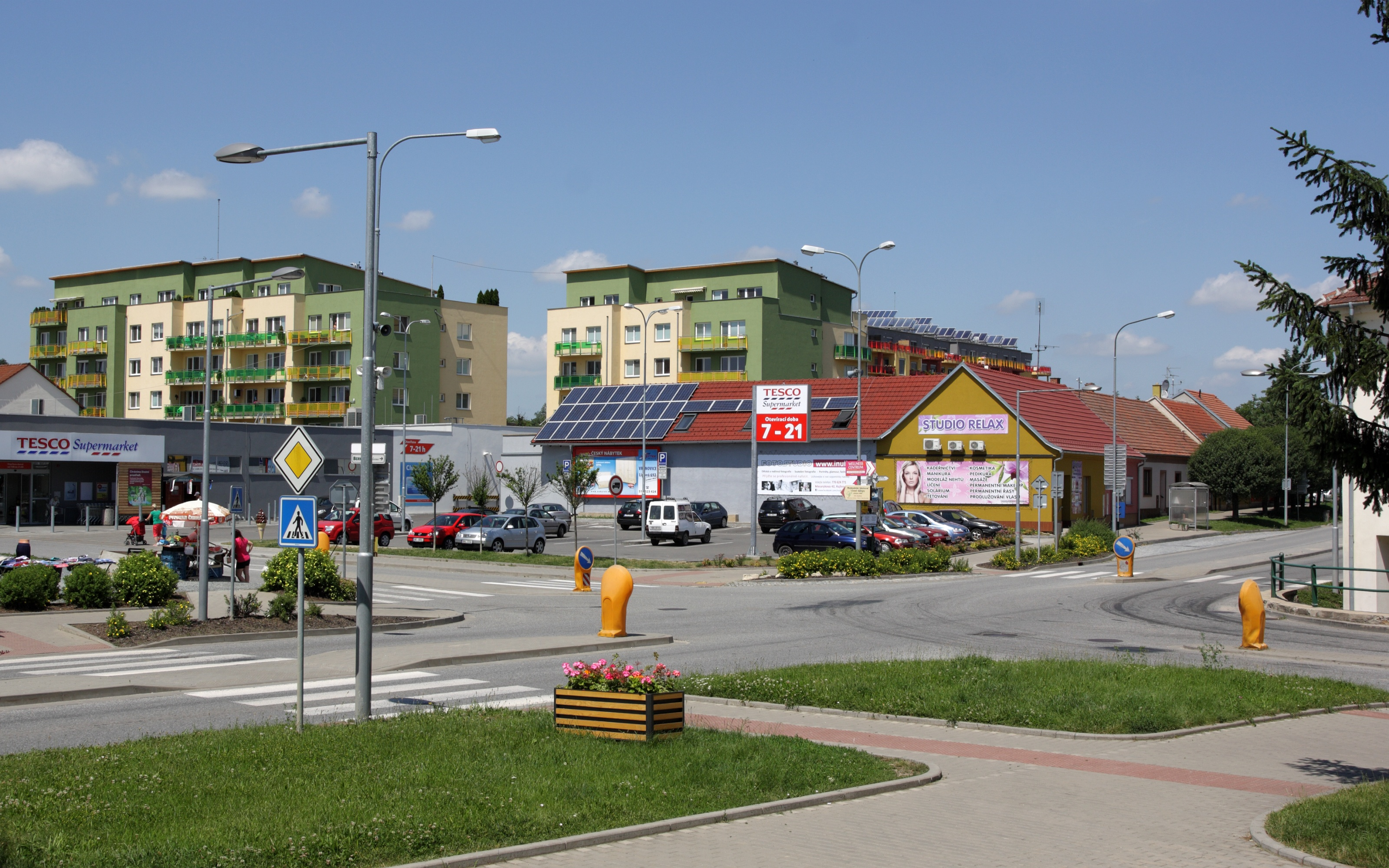 Rajhrad - křižovatka Městečko a Masarykova.